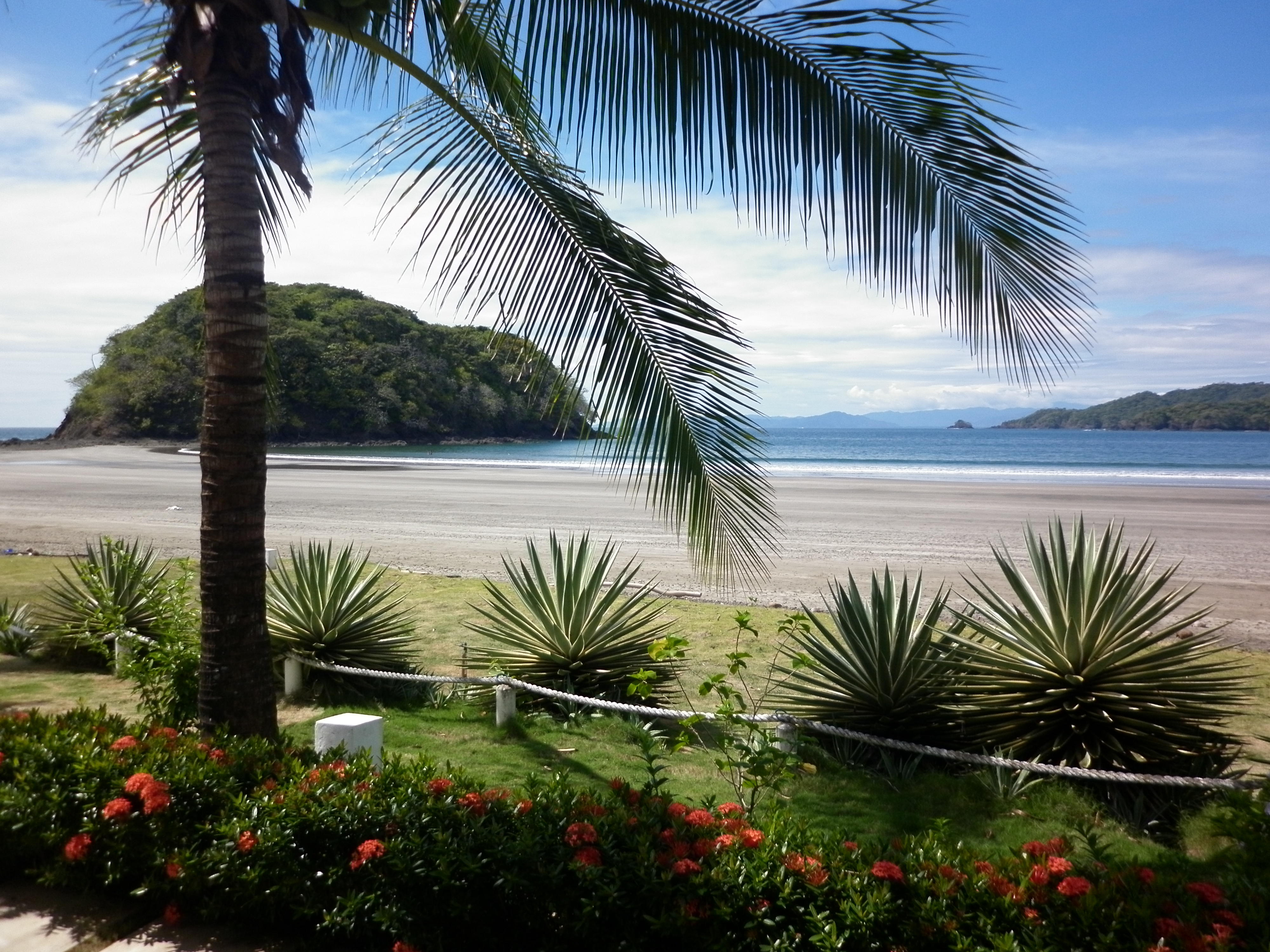 Playa Venao, Pedasí, Los Santos, Panamá.